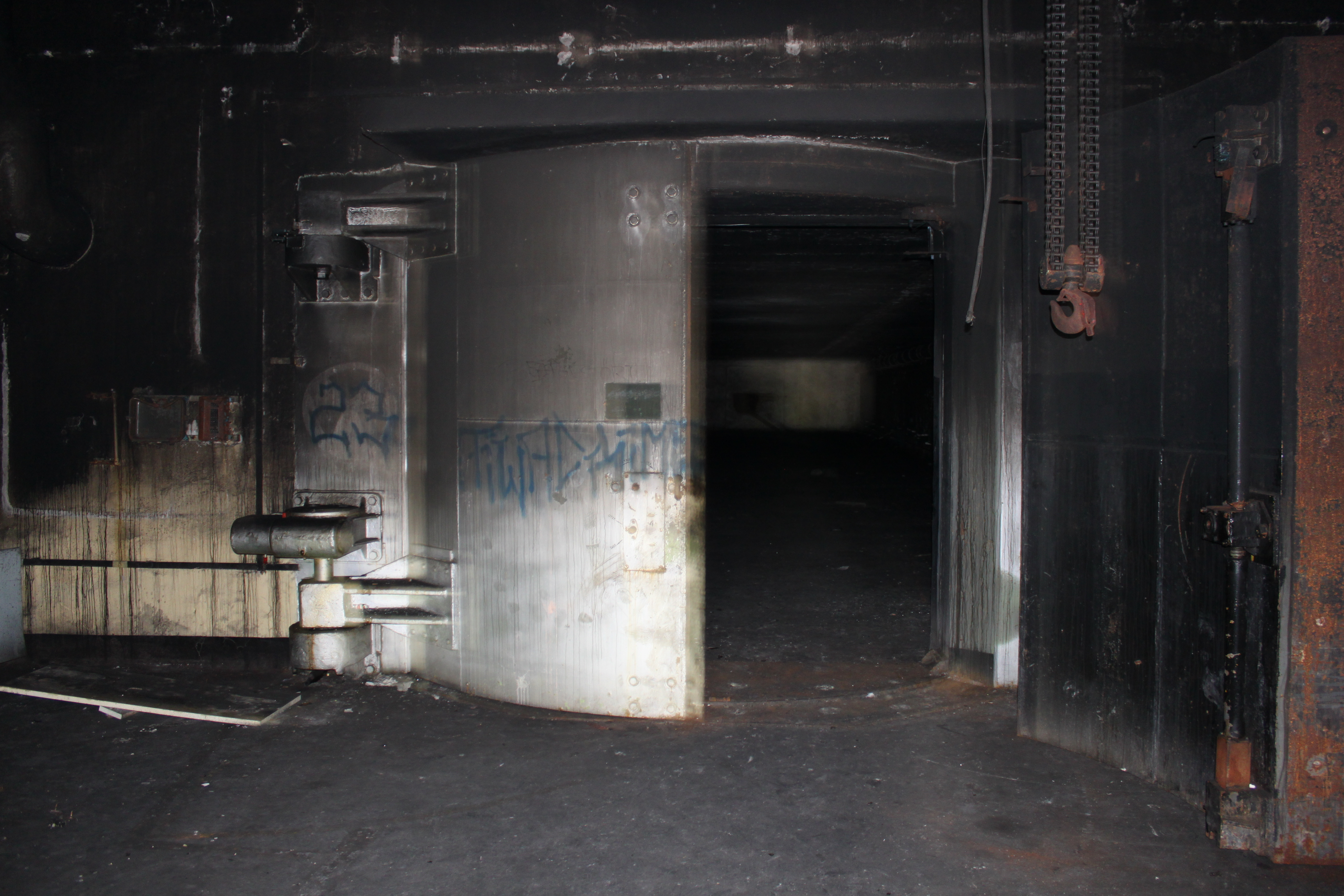 Das ehemalige Sonderwaffenlager der GSSD für nukleare Freifallbomben in Finsterwalde. Zustand 2010, durch Vandalismus und Müllbrand stark zerstört.